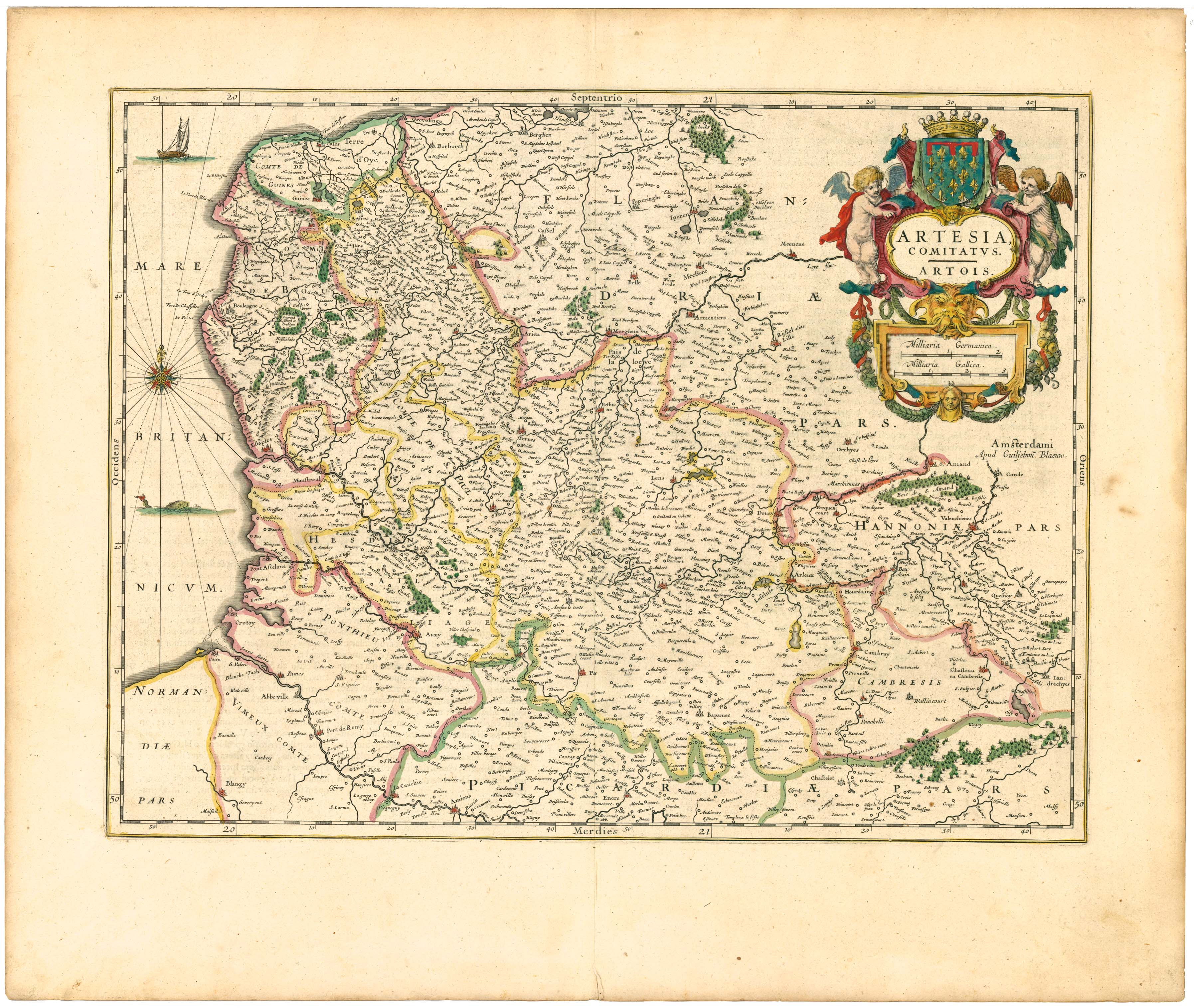 Artesia, Comitatus. ArtoisArtois (Pas-de-Calais).